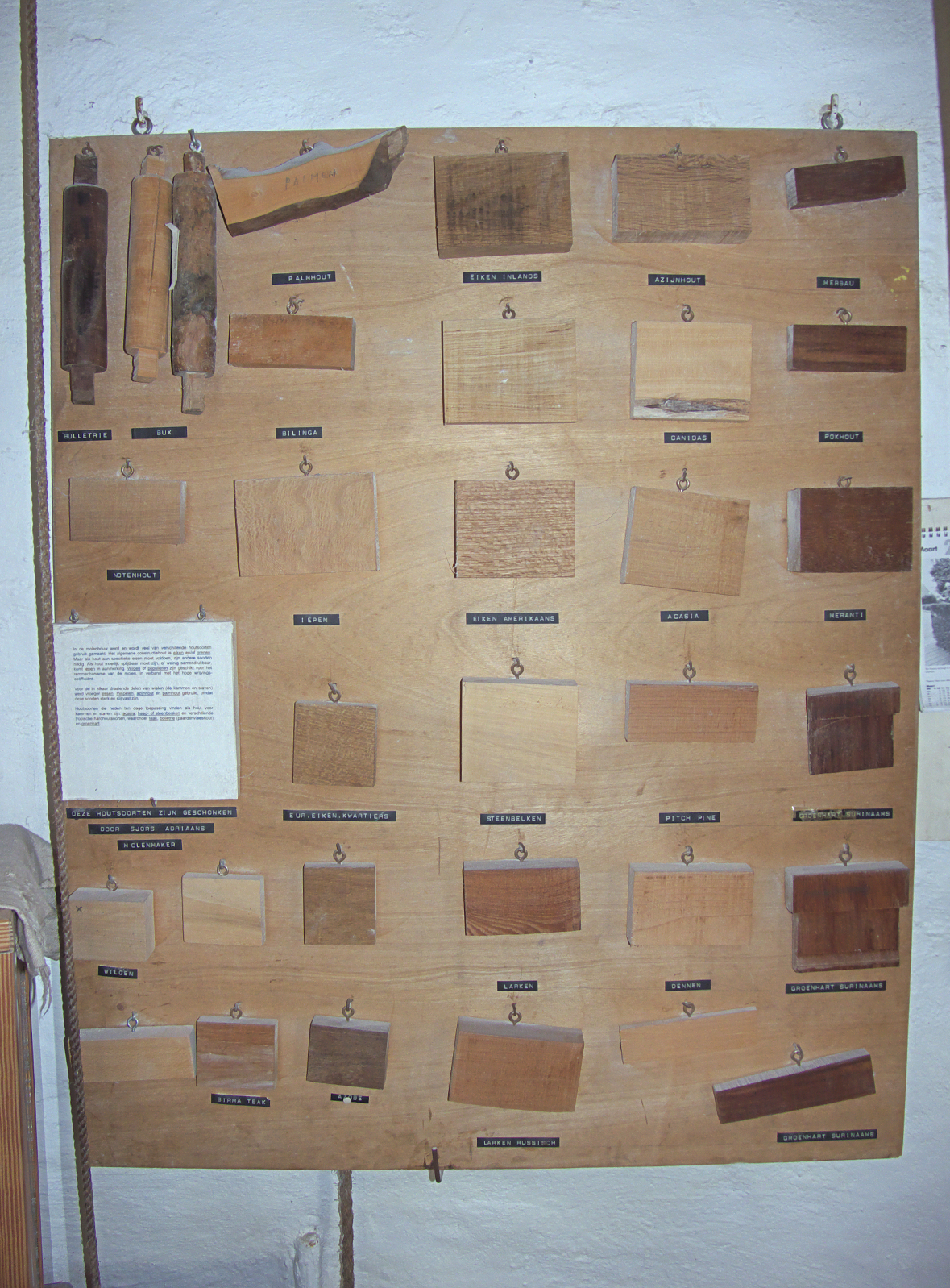 Houtsoorten gebruikt in de molenbouw